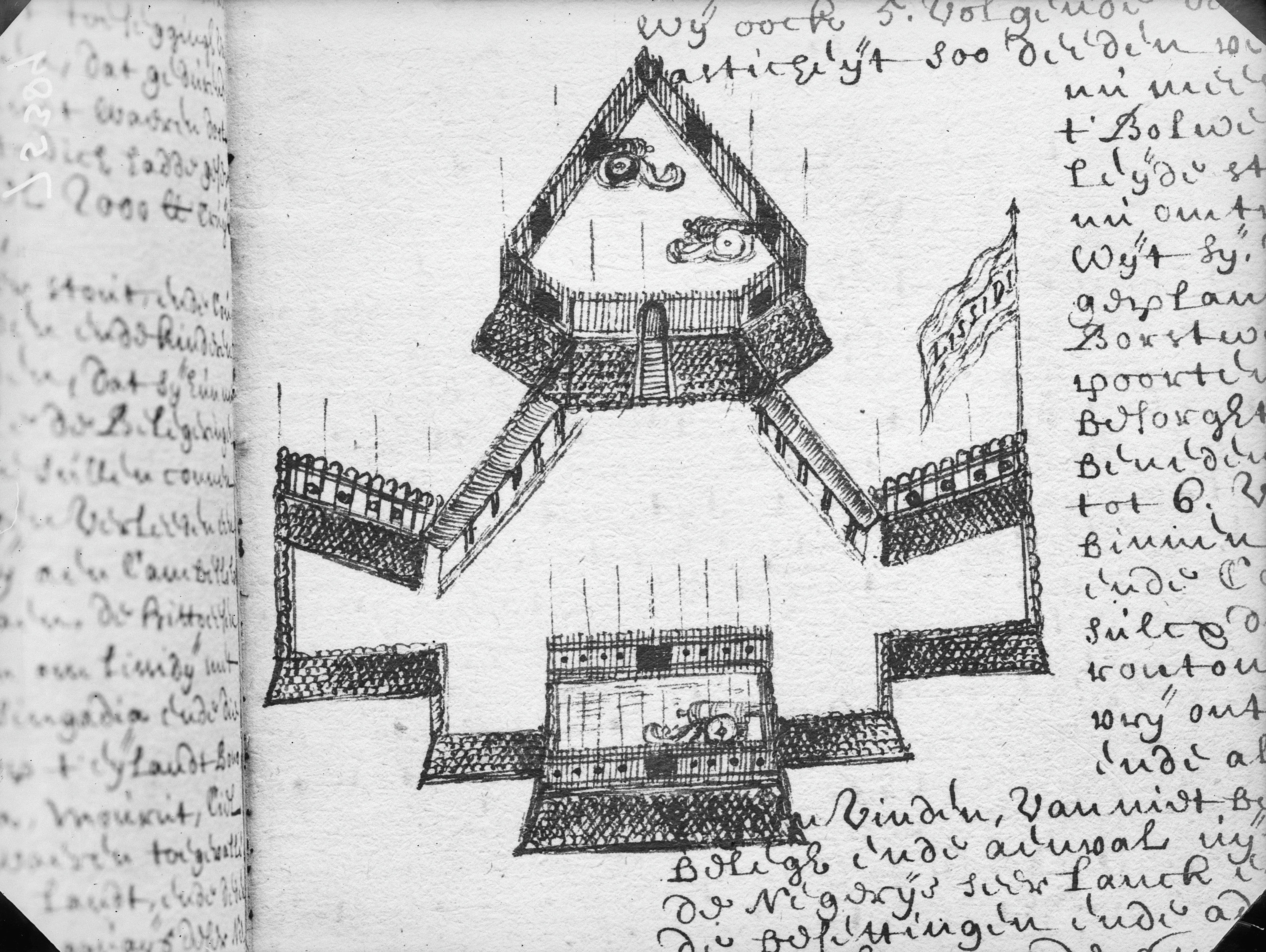 Manuscript met schets van Fort Lissidi (op de vlag aangegeven) van de VOC. NEDERLANDSE BOUWKUNST IN DE OOST: afkomstig van Dr.van Overvoorde. Vergelijk Atlas of Mutual Heritage.